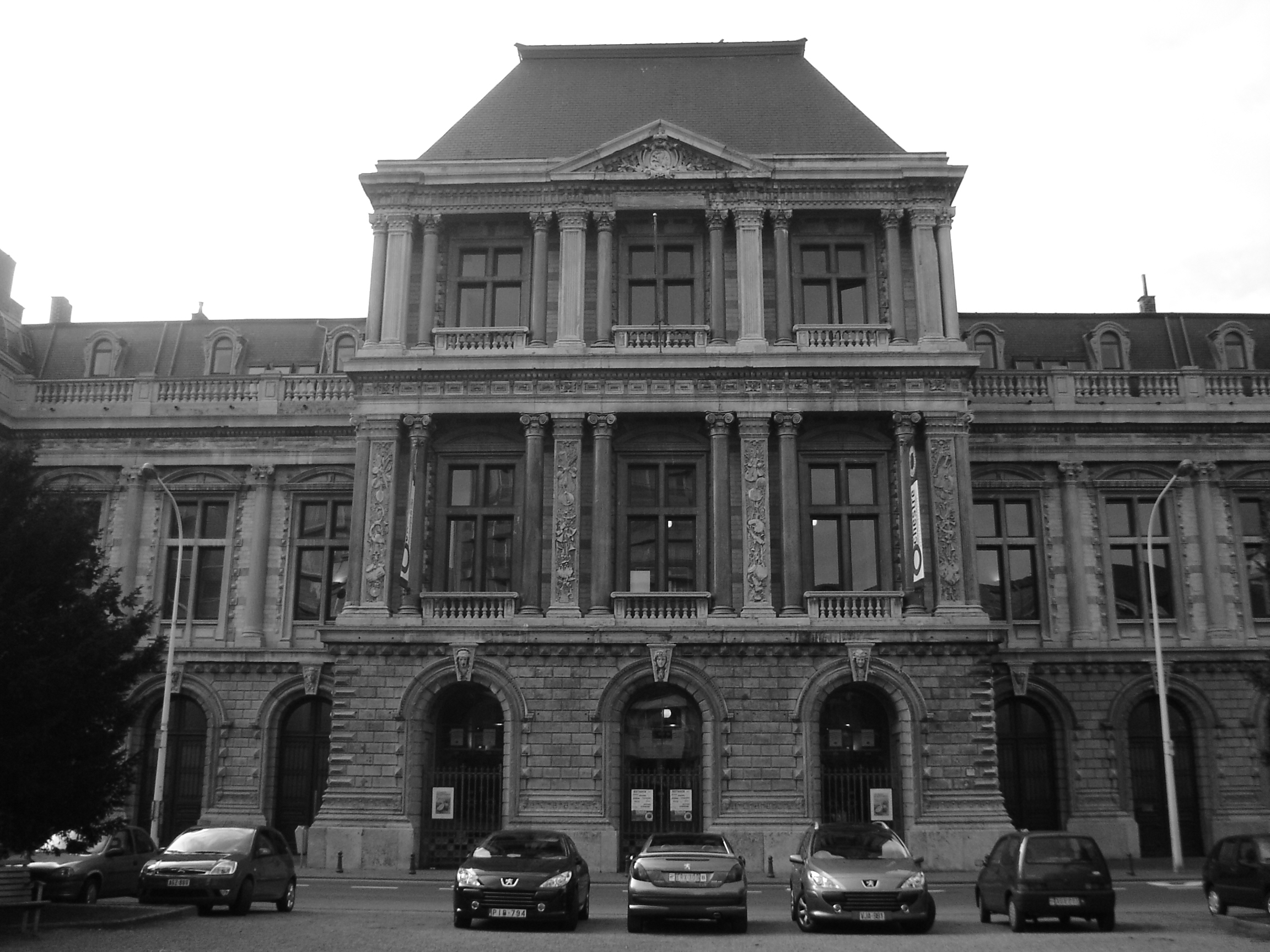 Conservatoire Royal de Musique, Liège, Belgique